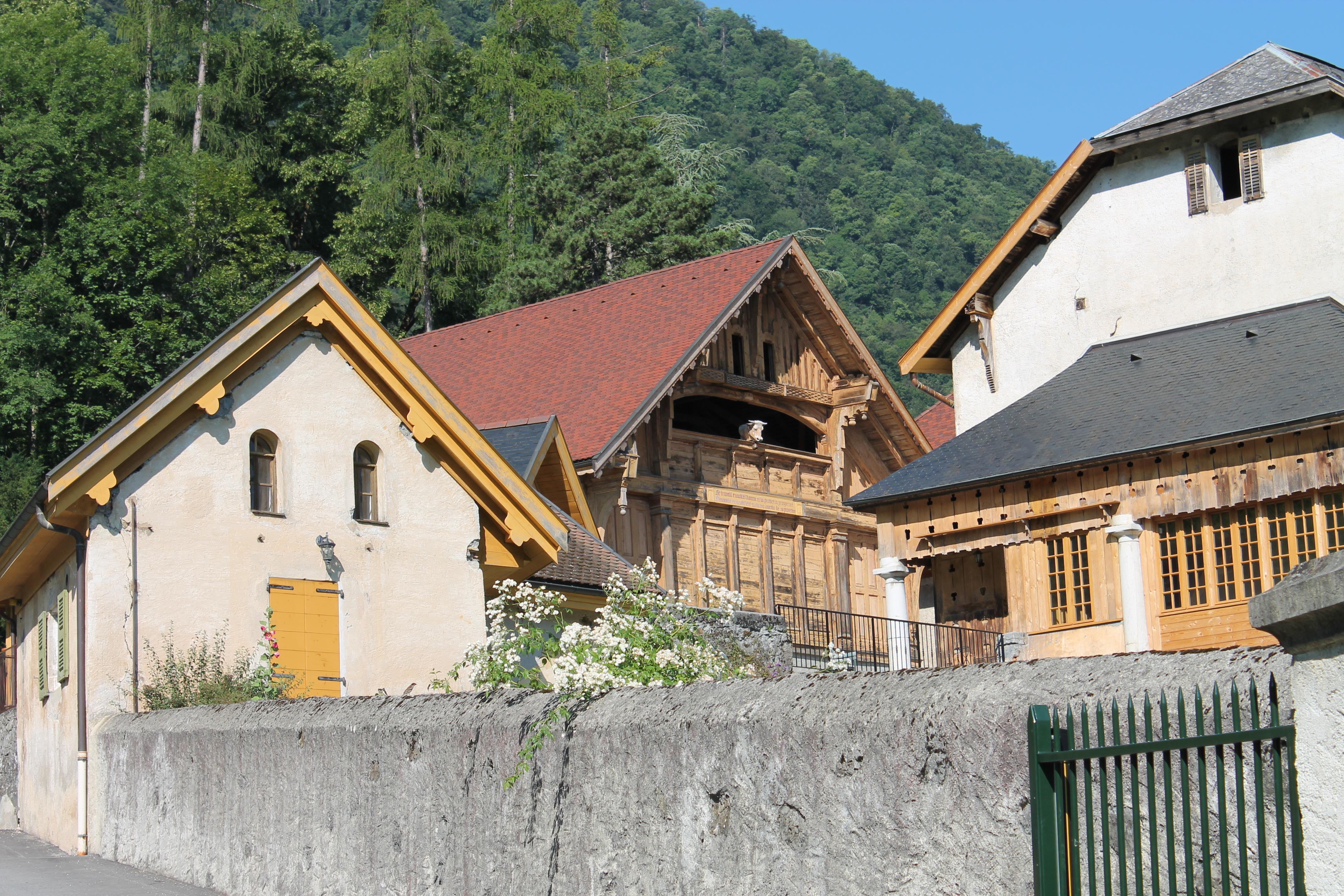 La ferme de Gy (XVIIe siècle) est une ancienne dépendance du château de Gye.